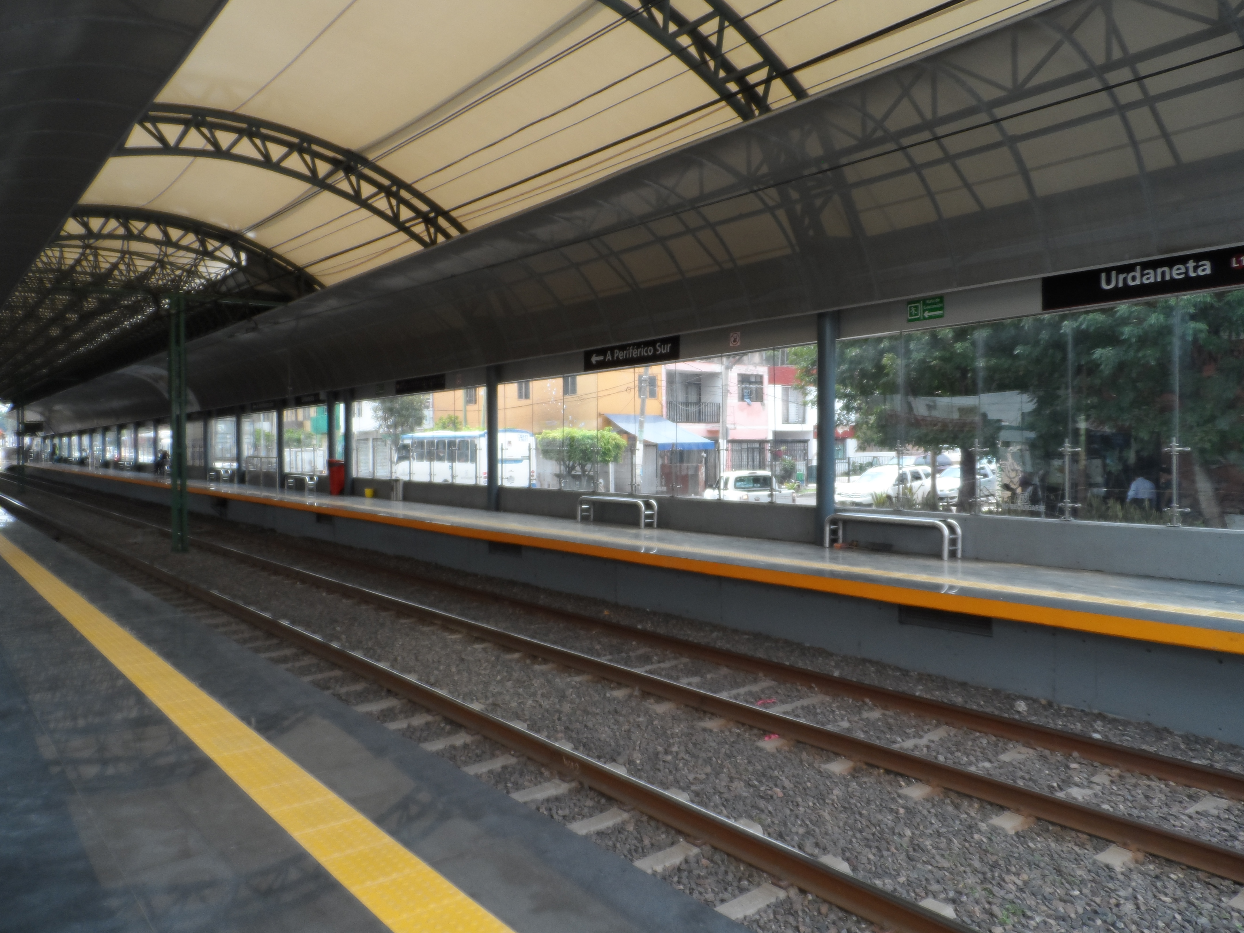 Andenes de la estación "Urdaneta de la Línea 1 del Tren Ligero de Guadalajara.